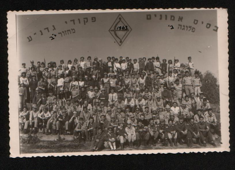 מה יש להוסיף? (למה אין סיווג נוסטלגיה?)